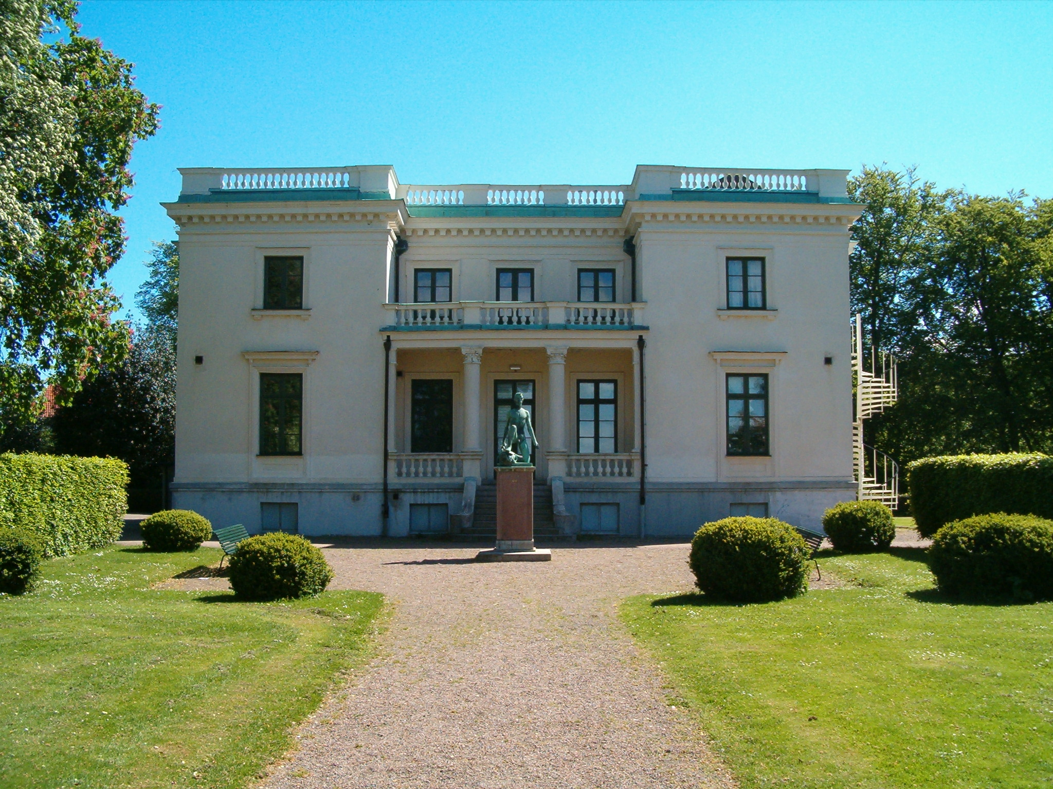 Vikingsberg Art Gallery.